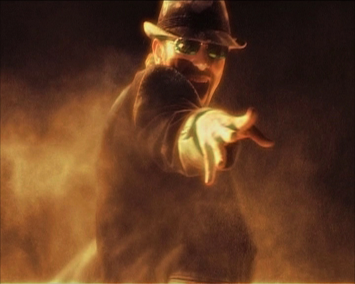 Horgas Ádám alkotása saját magáról